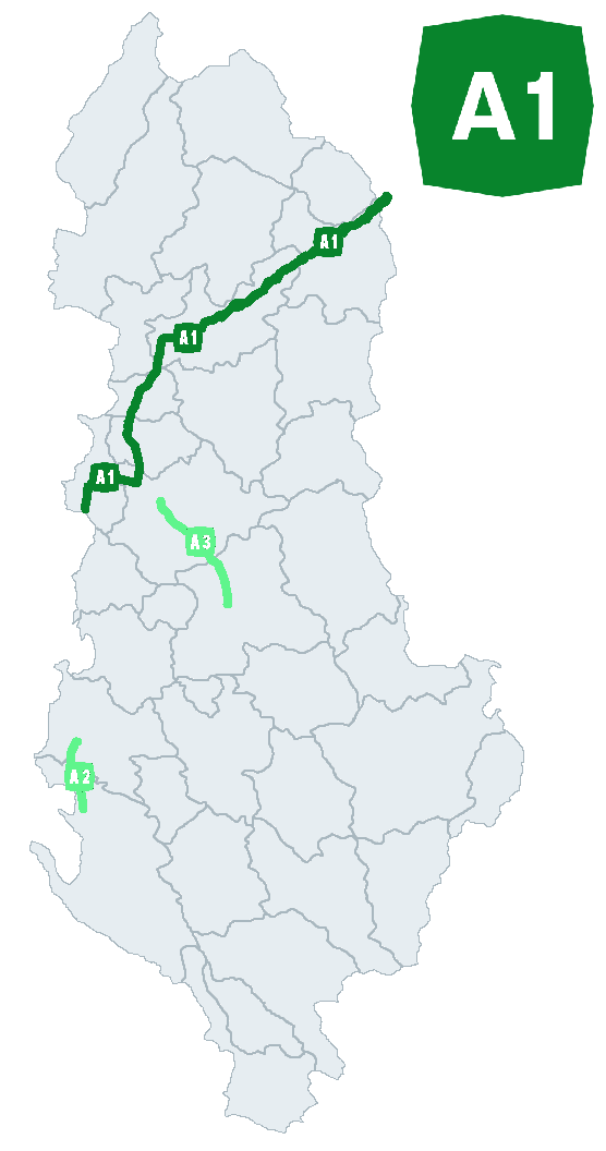 نقشه آزادراه در آلبانی